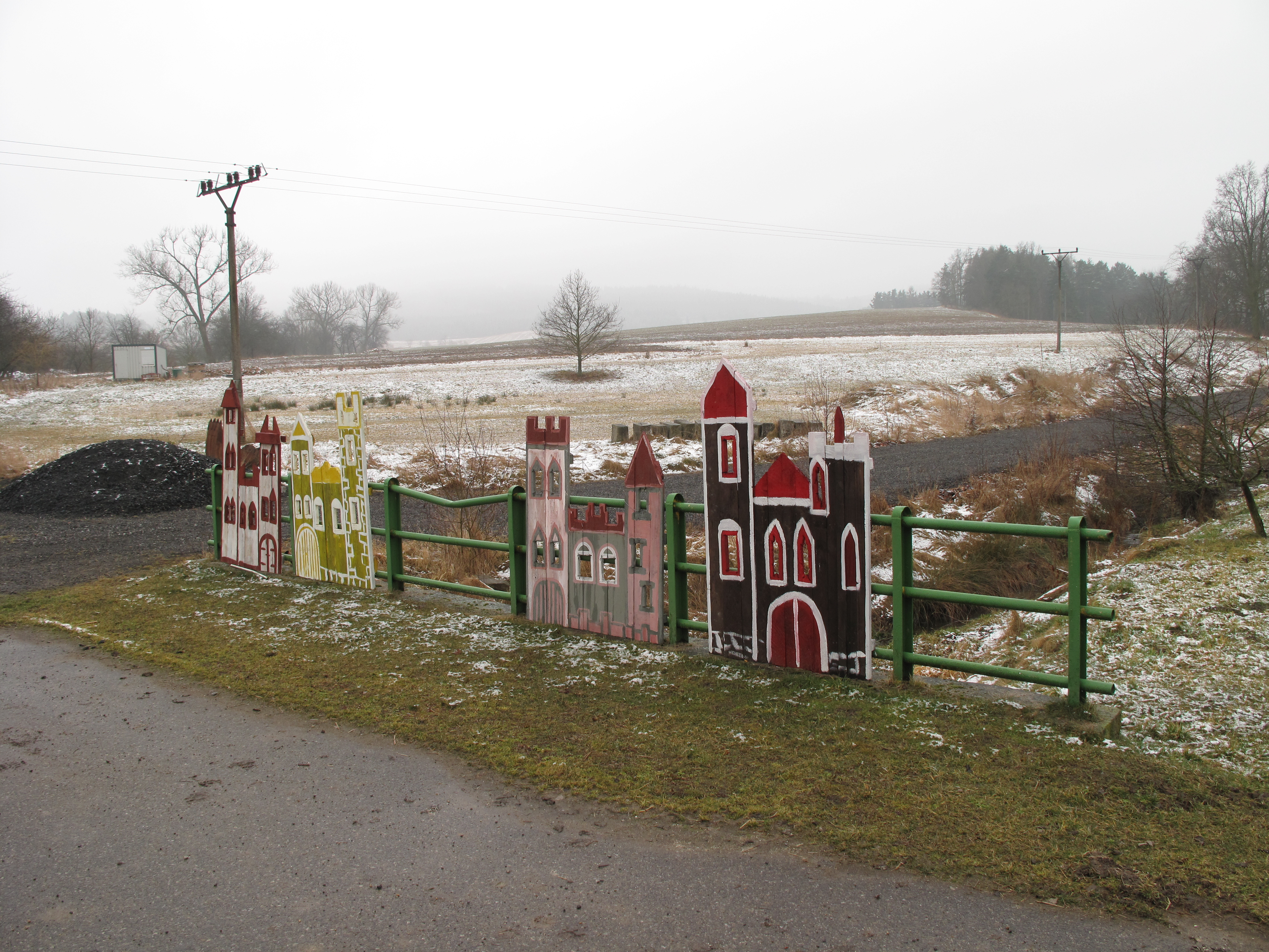 Hrady v Kváskovicích. Okres Strakonice, Česká republika.